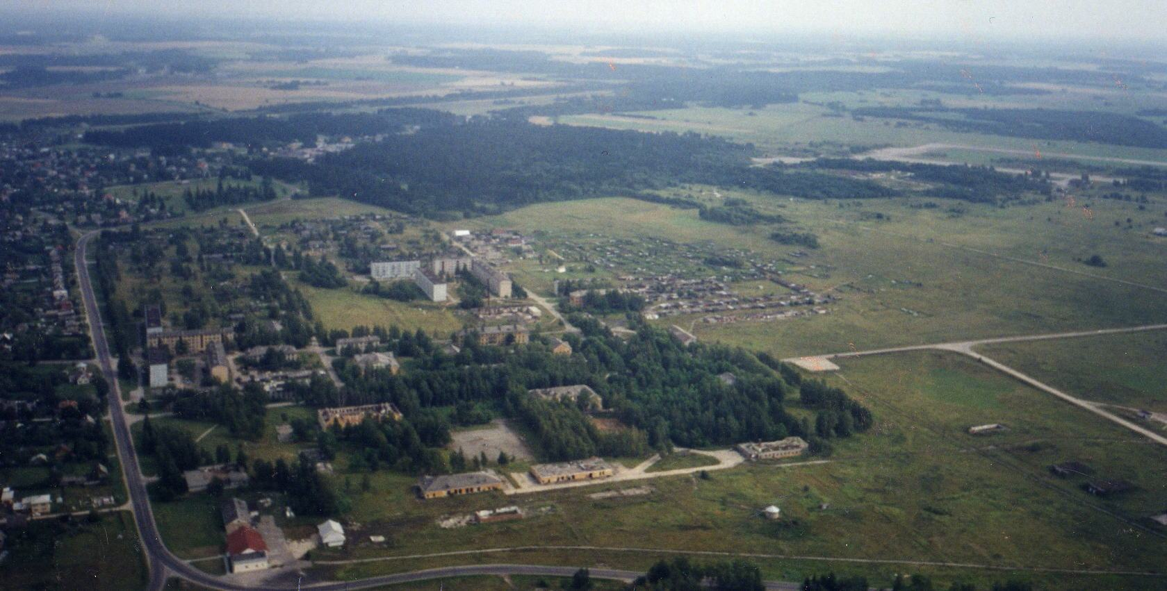 Жилой городок аэродрома Тапа